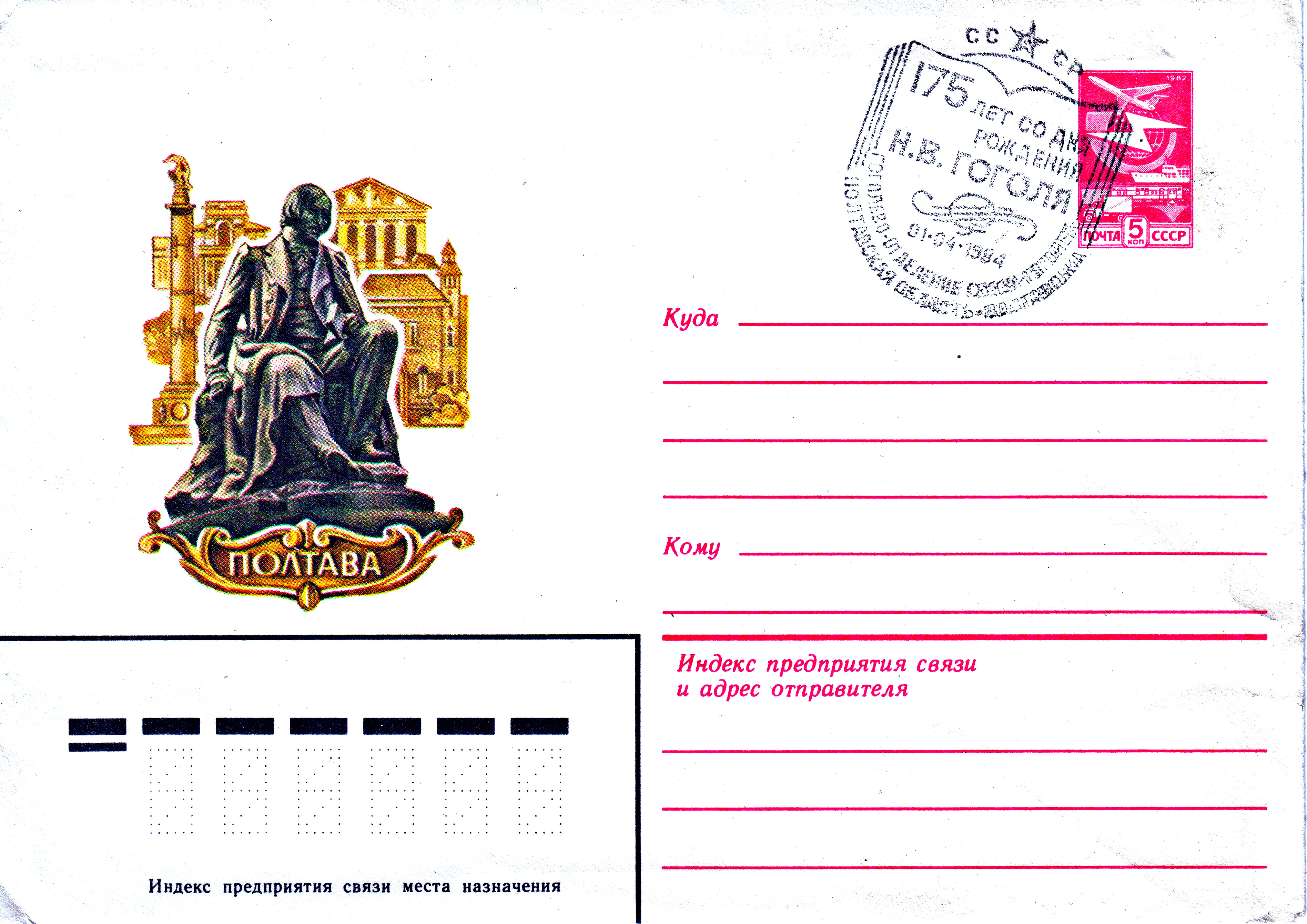 Почтовый конверт с юбилейным гашением "175 лет со дня рождения Н. В. Гоголя".